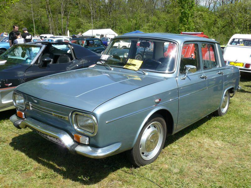 Photo prise le 01 Mai 2012 à Chelles.